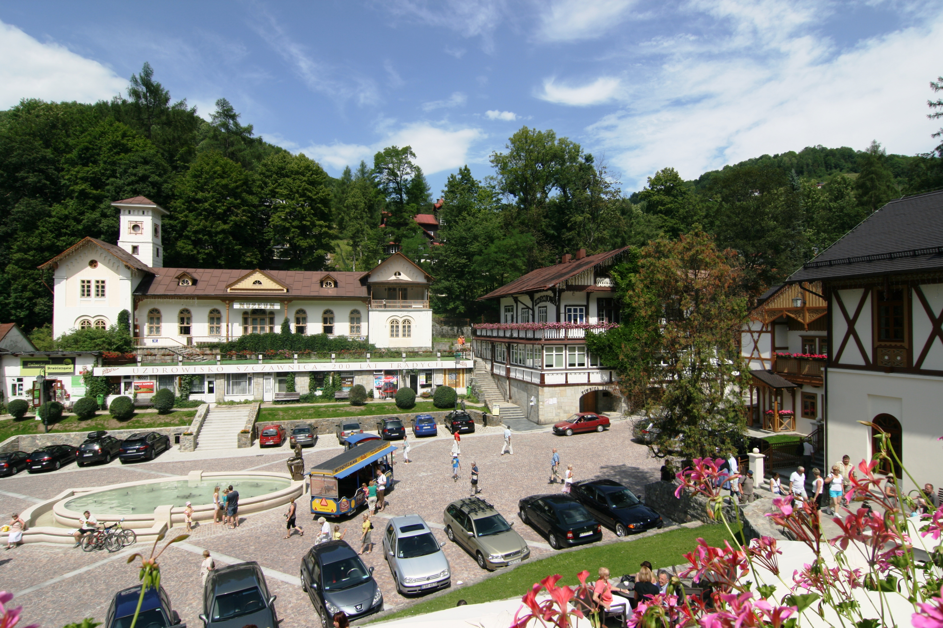 Widok ogólny na zachodnią część Placu Dietla. Od lewej widoczne są: Willa "Pałac" (muzeum), Willa "Pod Bogarodzicą", Willa "Holenderka" i Willa "Nad Zdrojami"